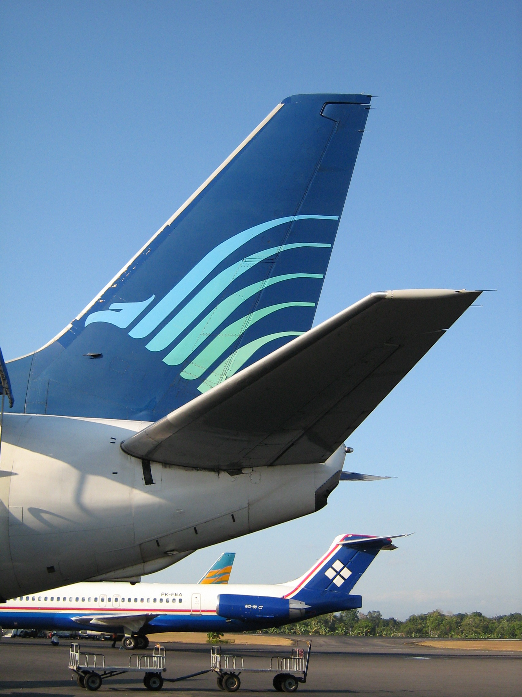 Garuda Indonesia, Airefata and Merpati Nusantara Airlines jets at Ujung Pandang airport